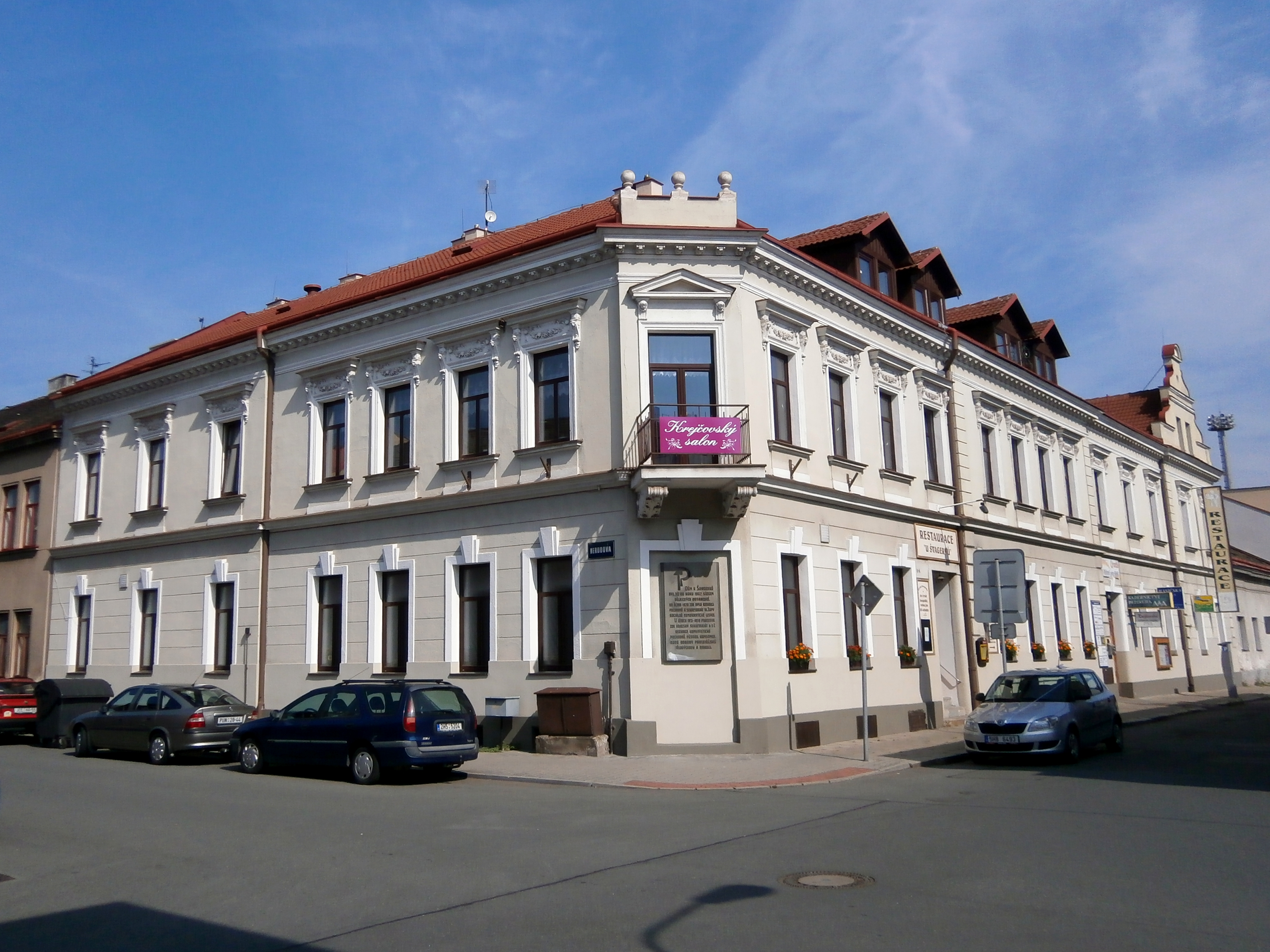 Dům U Švagerků (Všehrdova čp. 194)